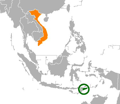 Localization of East Timor and Vietnam